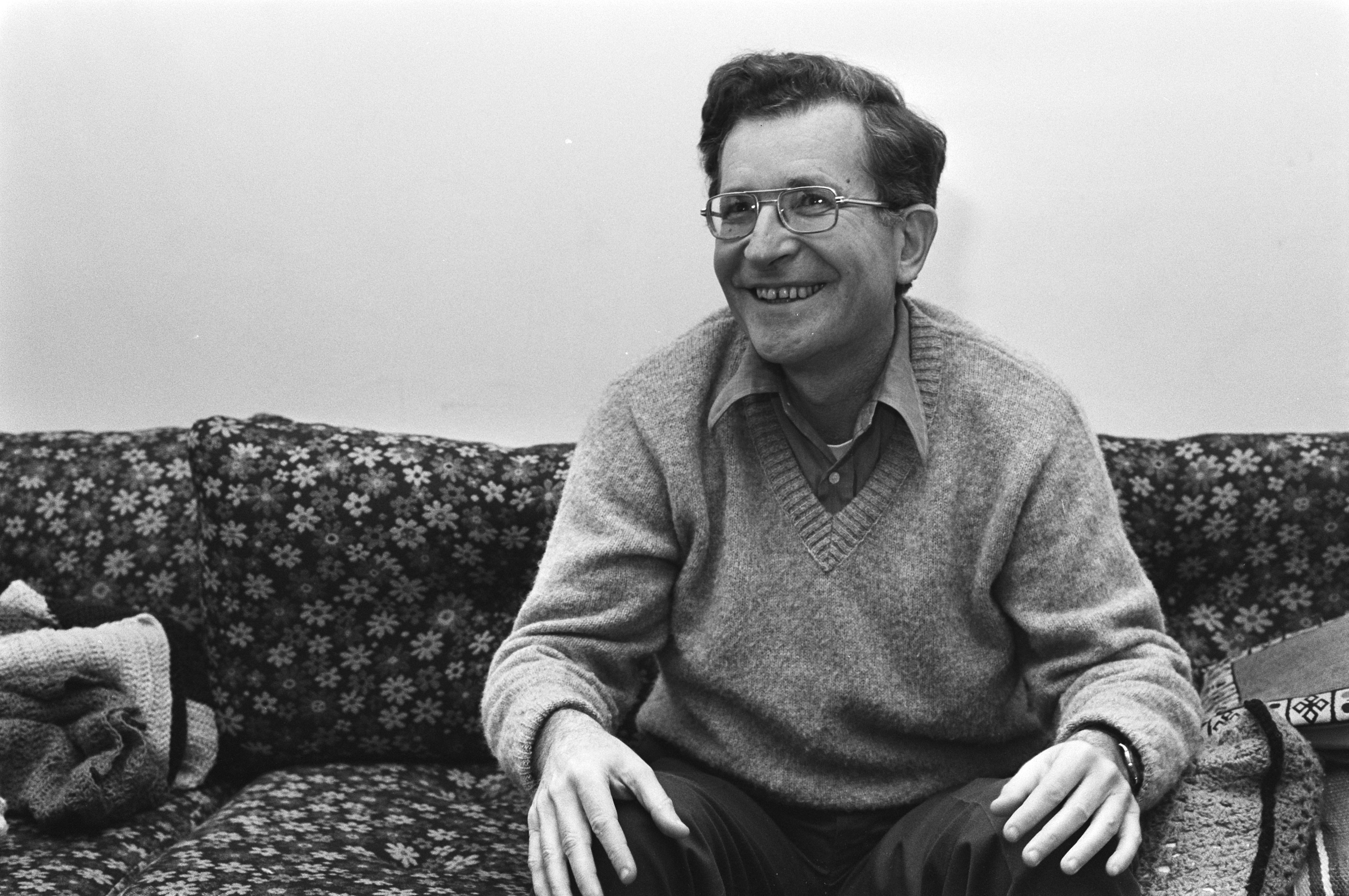 Collectie / Archief : Fotocollectie Anefo Reportage / Serie : [ onbekend ] Beschrijving : Prof. dr. Noam Chomsky Datum : 8 december 1977 Trefwoorden : hoogleraren, portretten, professoren, wetenschap Persoonsnaam : Chomsky, Noam Fotograaf : Peters, Hans / Anefo Auteursrechthebbende : Nationaal Archief Materiaalsoort : Negatief (zwart/wit) Nummer archiefinventaris : bekijk toegang 2.24.01.05 Bestanddeelnummer : 929-4752